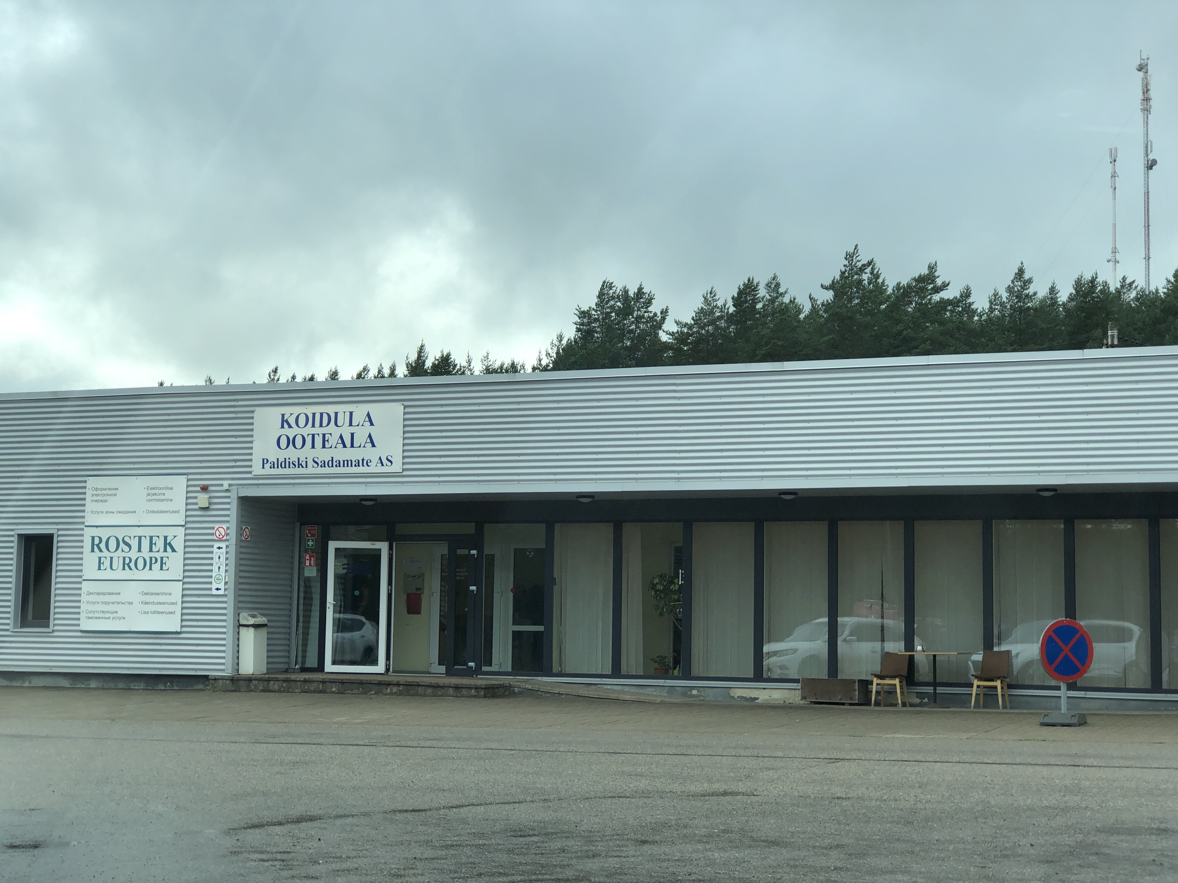 Площадка для ожидания на границе с Россией Койдула